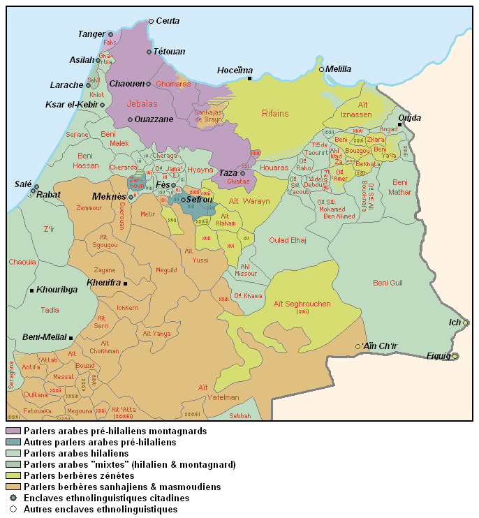 Carte ethno-linguistique du nord et de l'est du Maroc -création personnelle- Sources:-"La frontera entre el bereber y el árabe en el Rif" & "Materialien für einen Dialektatlas von Nordost-Marokko", de P. Behnstedt-"Carte des tribus des Jbala (et des Rifains)", de A. Amahane & J. Vignet-Zunz-Carte linguistique du Maroc, de G. S. Colin"La langue berbère dans les territoires du sud", de A. Basset Légende: i. Oudayas (Guich de Rabat) ; ii. Mejjat (Guich de Meknès) ; iii. Hejaoua ; iv. Oulad Aïssa ; v. Oulad el-Haj Saïs (Guich de Fès) ; vi. Chrardas (Guich de Fès) ; vii. Oudayas (Guich de Fès) ; viii. Arab Saïs (Guich de Fès) ; ix. Hamiane (Guich de Fès) ; x. Lemta ; xi. Oulad el-Haj el-Oued (Guich de Fès) ; xii. Behalil ; xiii. Tribus du Pachalik de Sefrou (Kechtala-Aït Youssi) ; xiv. Sejâ (Guich de Fès) ; xv. Aït Youb ; xvi. Marmoucha ; xvii. Aït Seghrouchen ; xviii. Aït Sadden ; xix. Yazgha ; xx. Aït Ayache ; xxi. Meknassa ; xxii. Maghraoua ; xxiii. Beni Oukil ; xxiv. Sejâ ; xxv. Rwabâ ; xxvi. Haddyin ; xxvii. Mehaya ; xxviii. Aït Morghi ; xxix. Ahl Ksabi ; xxx. Oulad Sidi Belkacem ; xxxi. Aït Sedrat ; xxxii. Aït 'Abbas ; xxxiii. Aït Bougmaz ; xxxiv. Aït Bouknafen ; xxxv. Ihansalen ; xxxvi. Ghodjama ; xxxvii. Imeghran